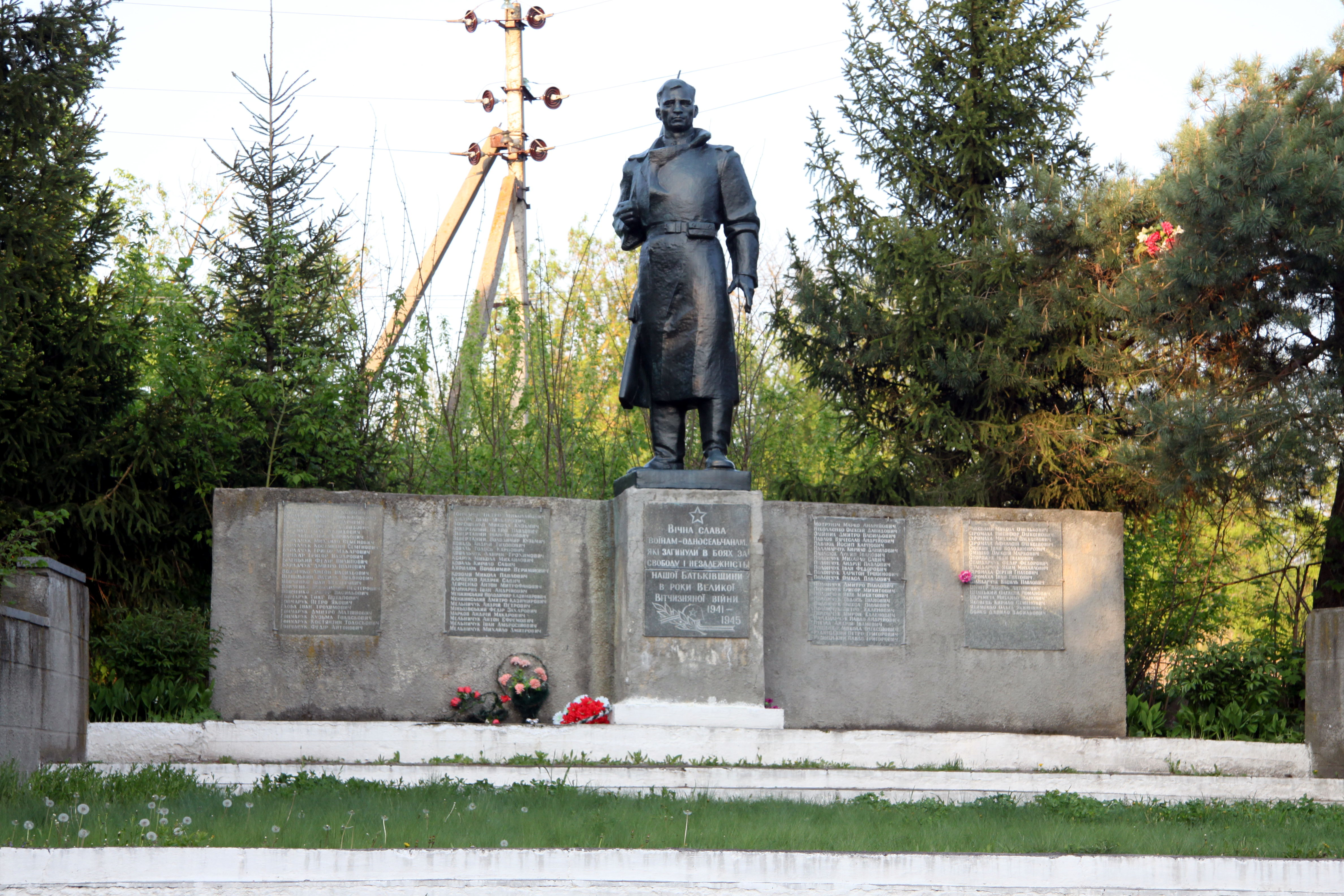 Пам’ятник 90 воїнам – односельчанам, загиблим на фронтах ВВВ, біля церкви, Круподеринці